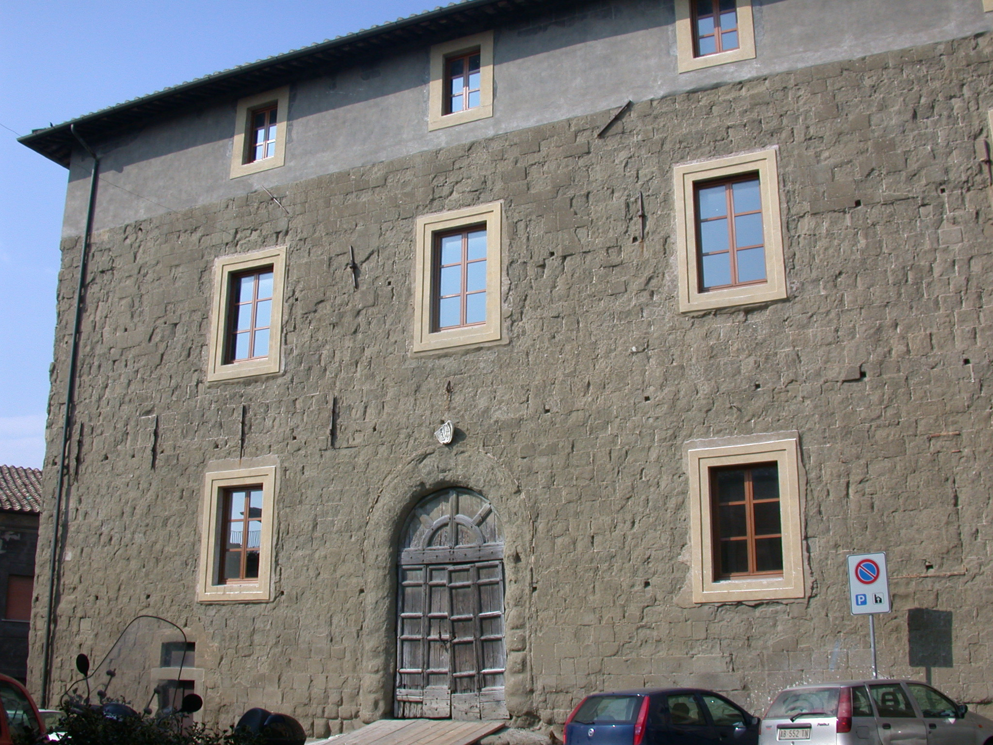 Italia, Regione Lazio, Provincia di Roma, Formello, Piazza San Lorenzo, Palazzo Chigi (già Orsini)